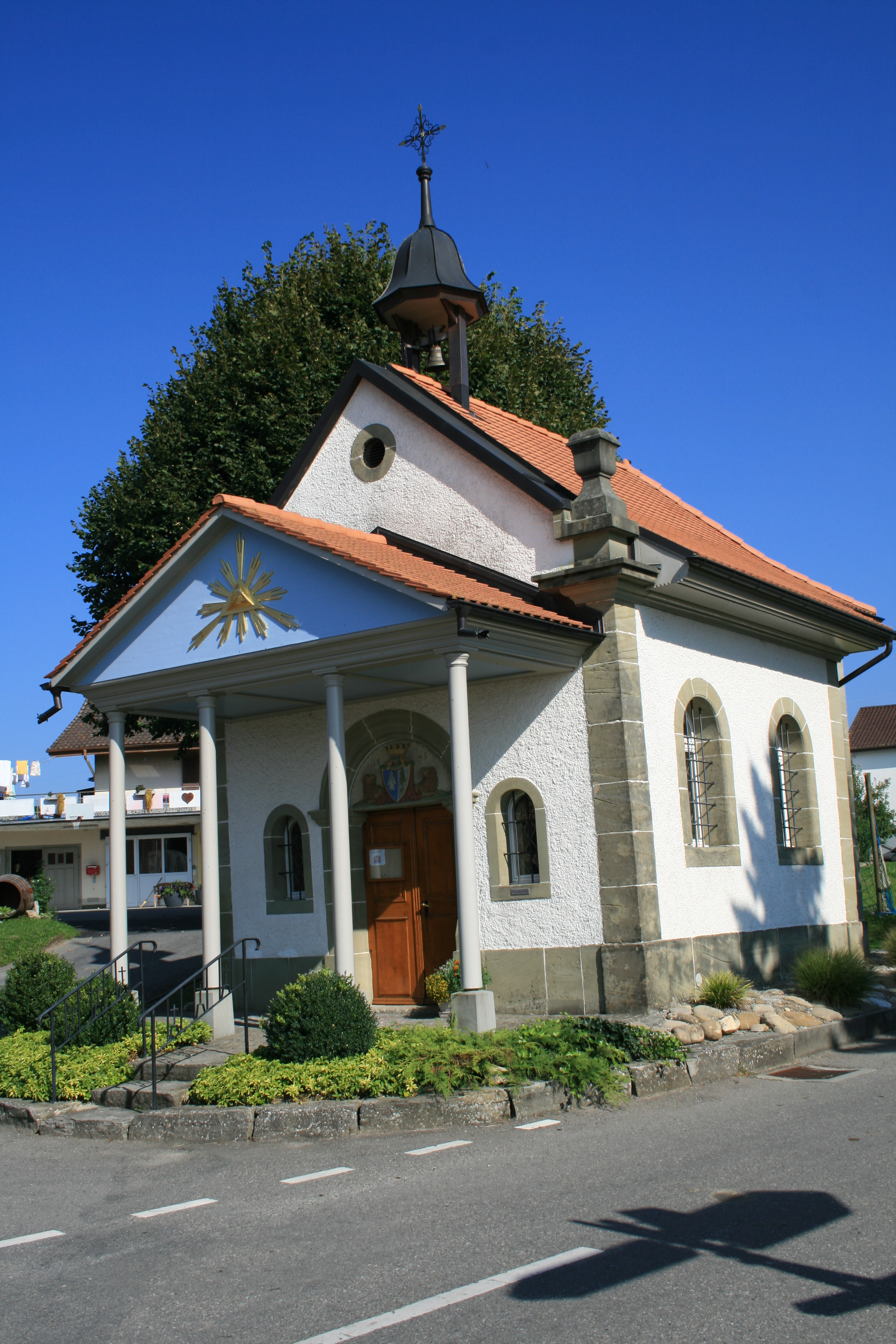 Kapelle Unsere Liebe Frau, Obermonten, Gem. St. Antoni